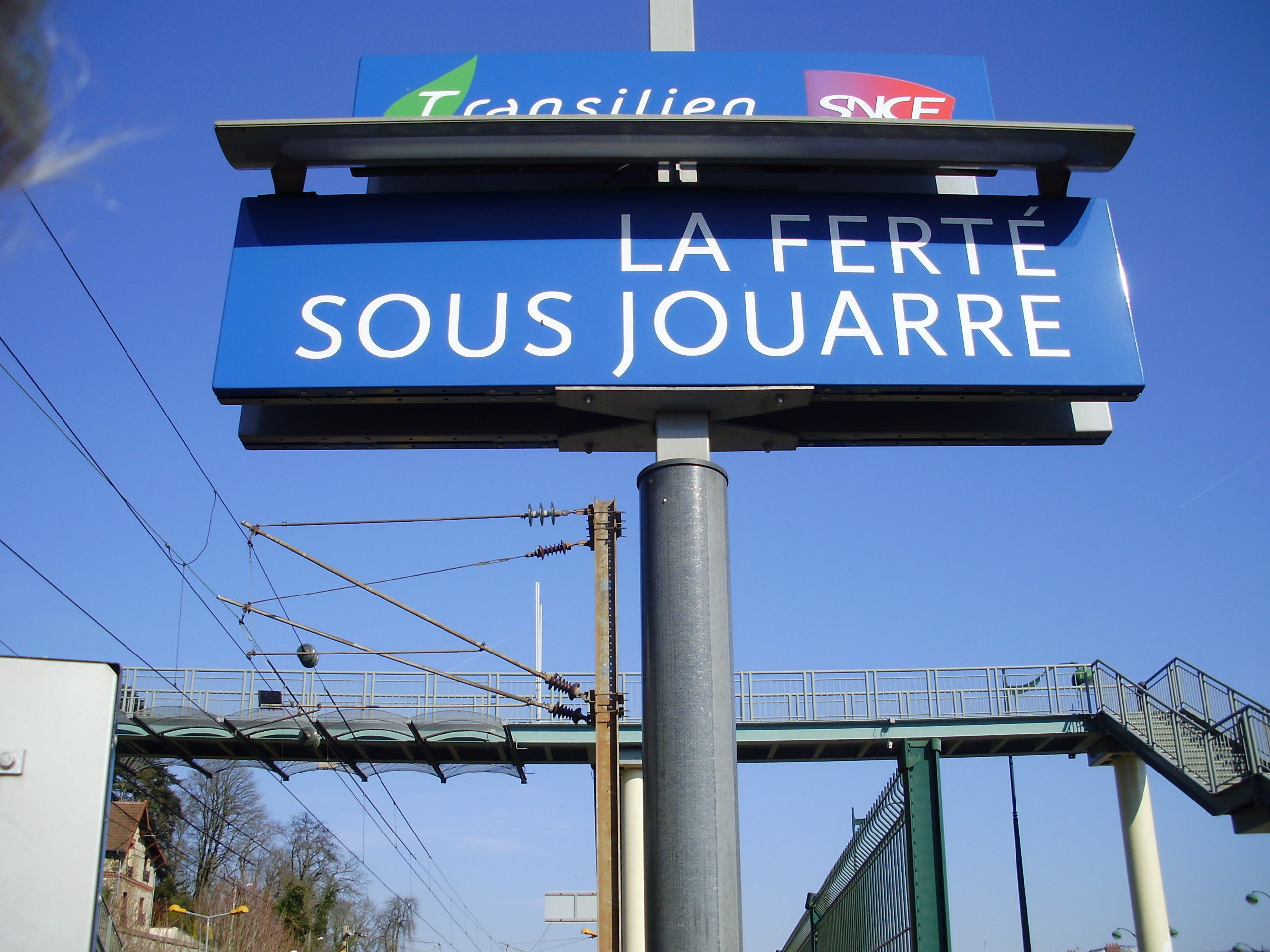 Gare de La Ferté-sous-Jouarre, Seine-et-Marne, France (Panneau signalétique)